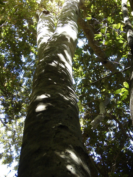 Aextoxicon punctatum en la subida al Cerro Santa Inés, límite entre la IV y V Región